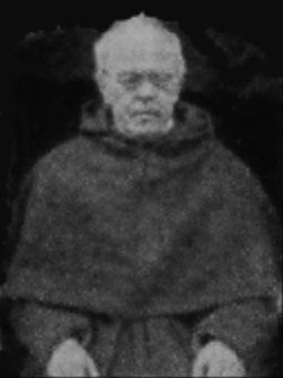 Pater Pius Keller († 1904)